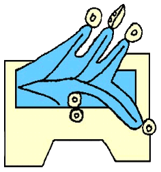 Glifo del municipio de Tlaxcoapan, Hgo.